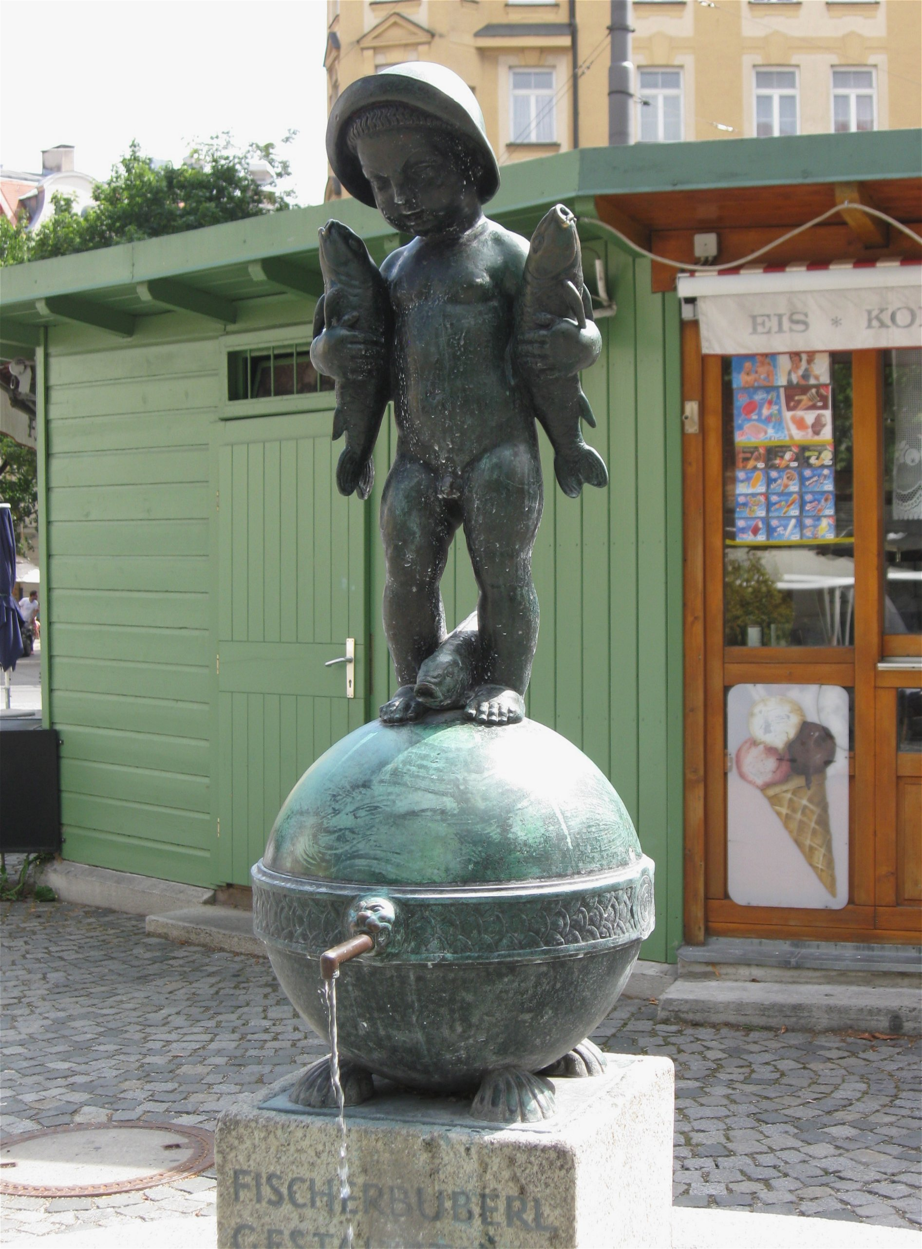 Wiener Platz; Fischerbuberl-Brunnen, Bronzefigur eines Knaben mit Fischen von Bildhauer Ignatius Taschner († 1913), auf Postament in Becken 1934 abermals 1979 bzw. 2002 neu aufgestellt; vor dem Gebäude Wiener Platz 5